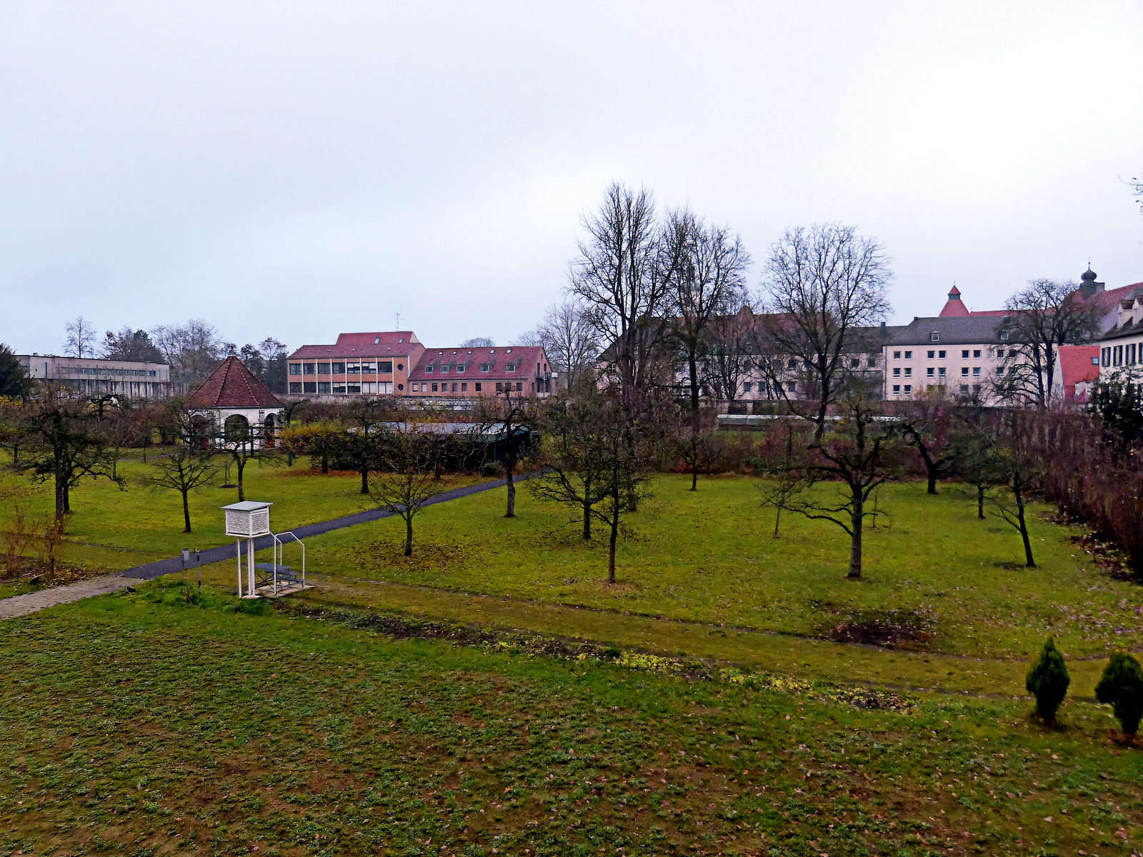 Der etwa einen Hektar große Klostergarten der Benediktinerabtei Sankt Stephan in Augsburg, vom Fugger-und-Welser-Erlebnismuseum aus gesehen.